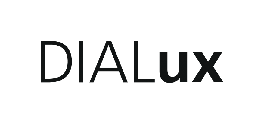 DIALux evo und DIALux 4